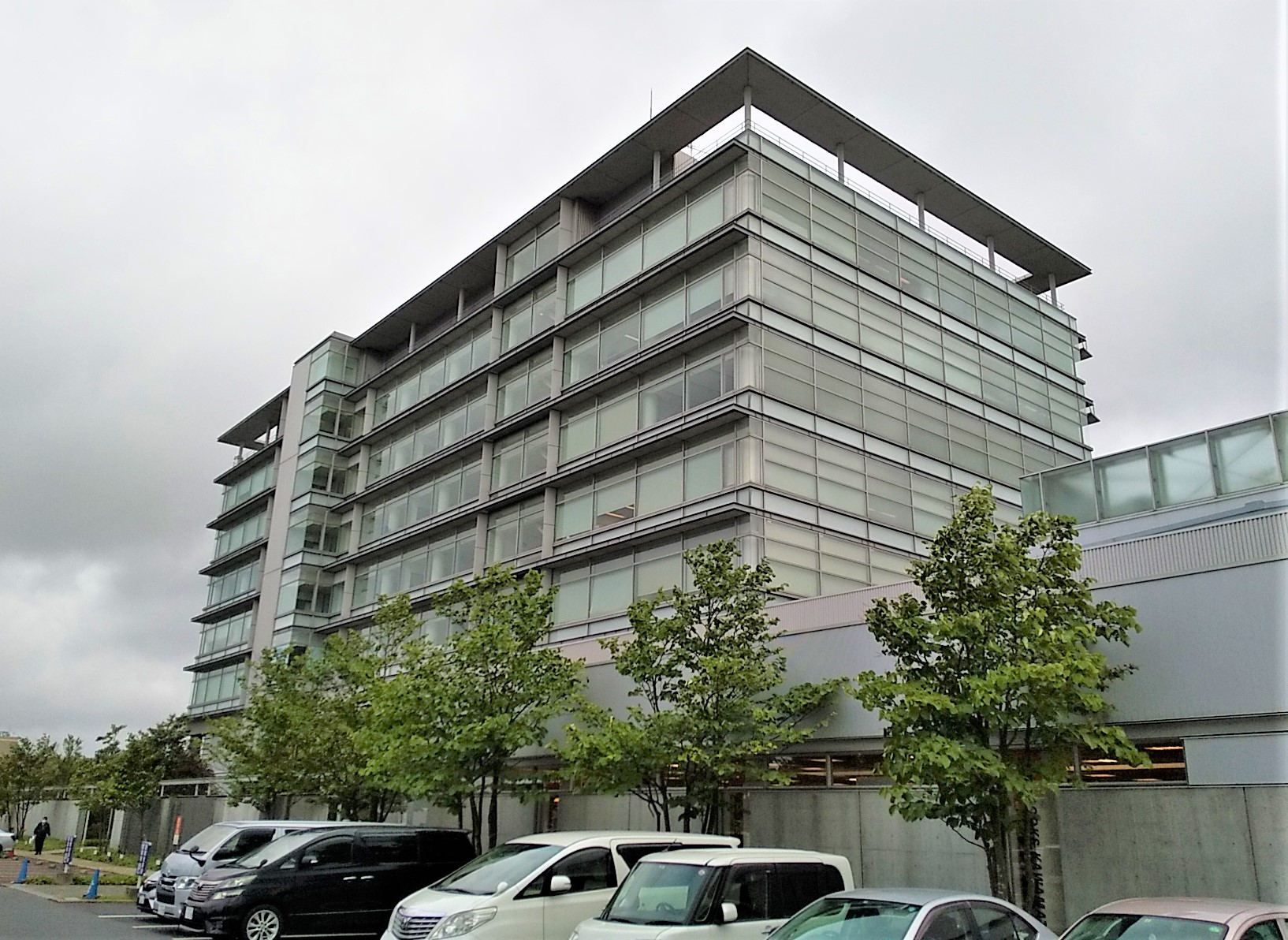 茨城県開発公社ビル